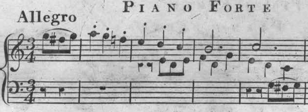 London: Monzani & Hill, n.d.[1807-13].